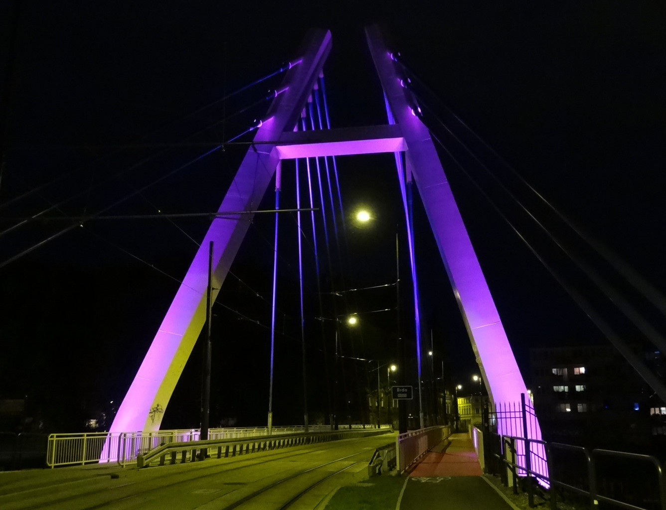 Most tramwajowy im. Władysława Jagiełły nad Brdą w Bydgoszczy